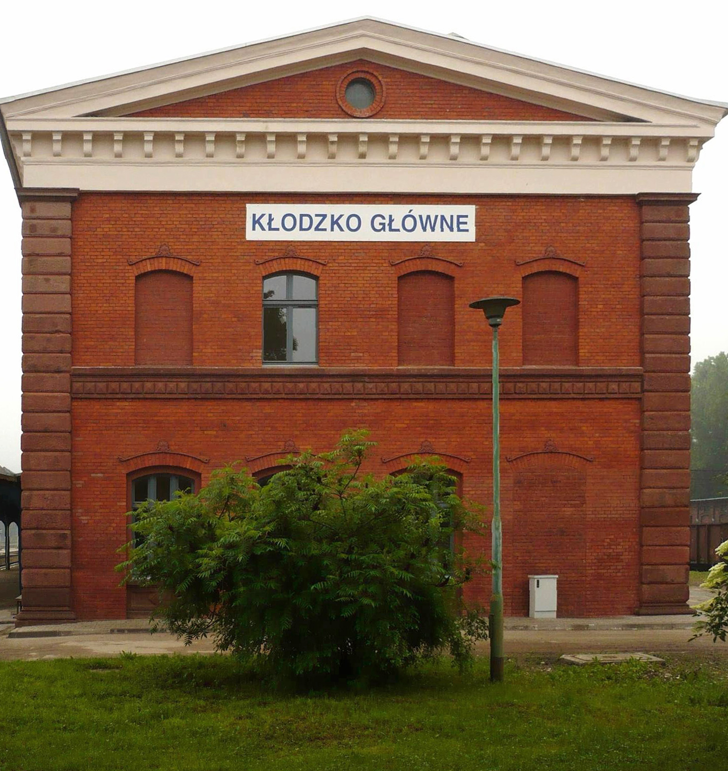 Dworzec Kłodzko Główne, 2013 r.